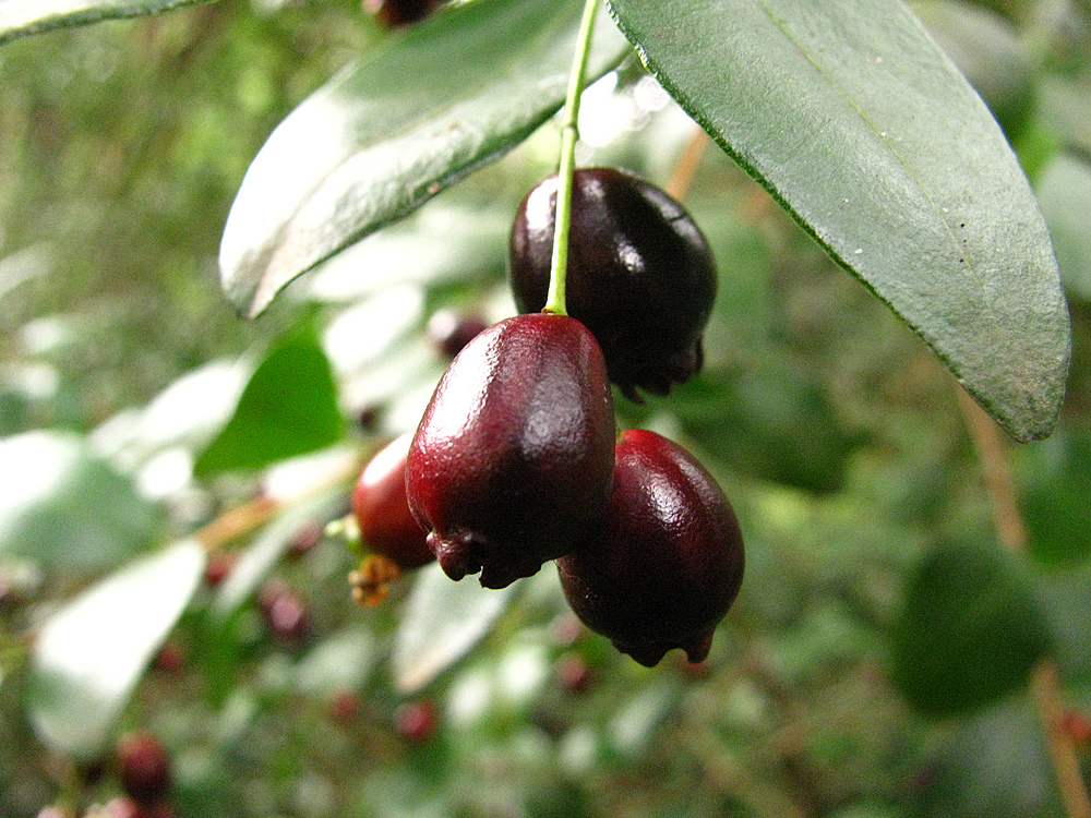 Temu (Blepharocalix cruckshanskii) - fruits